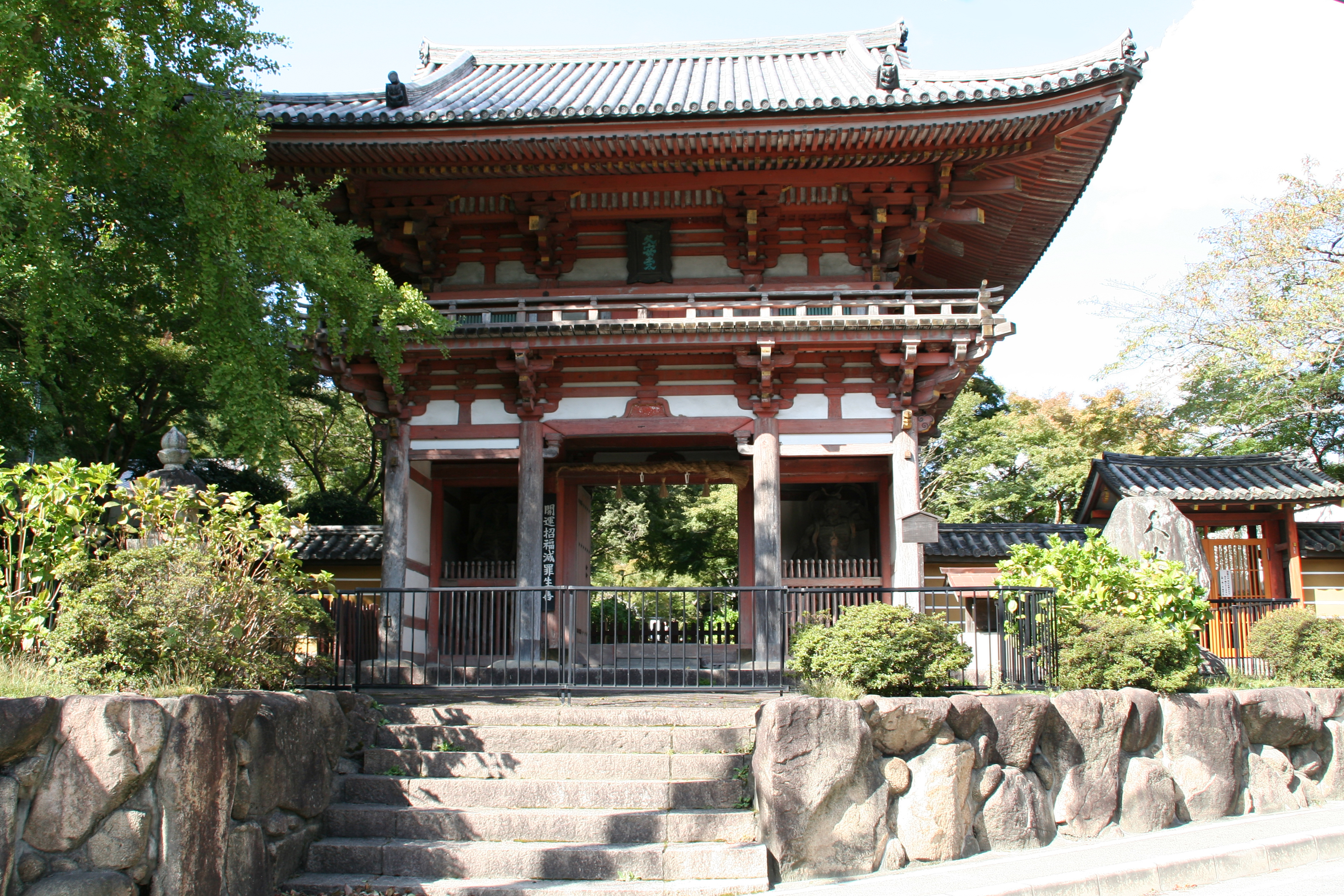 久安寺 楼門